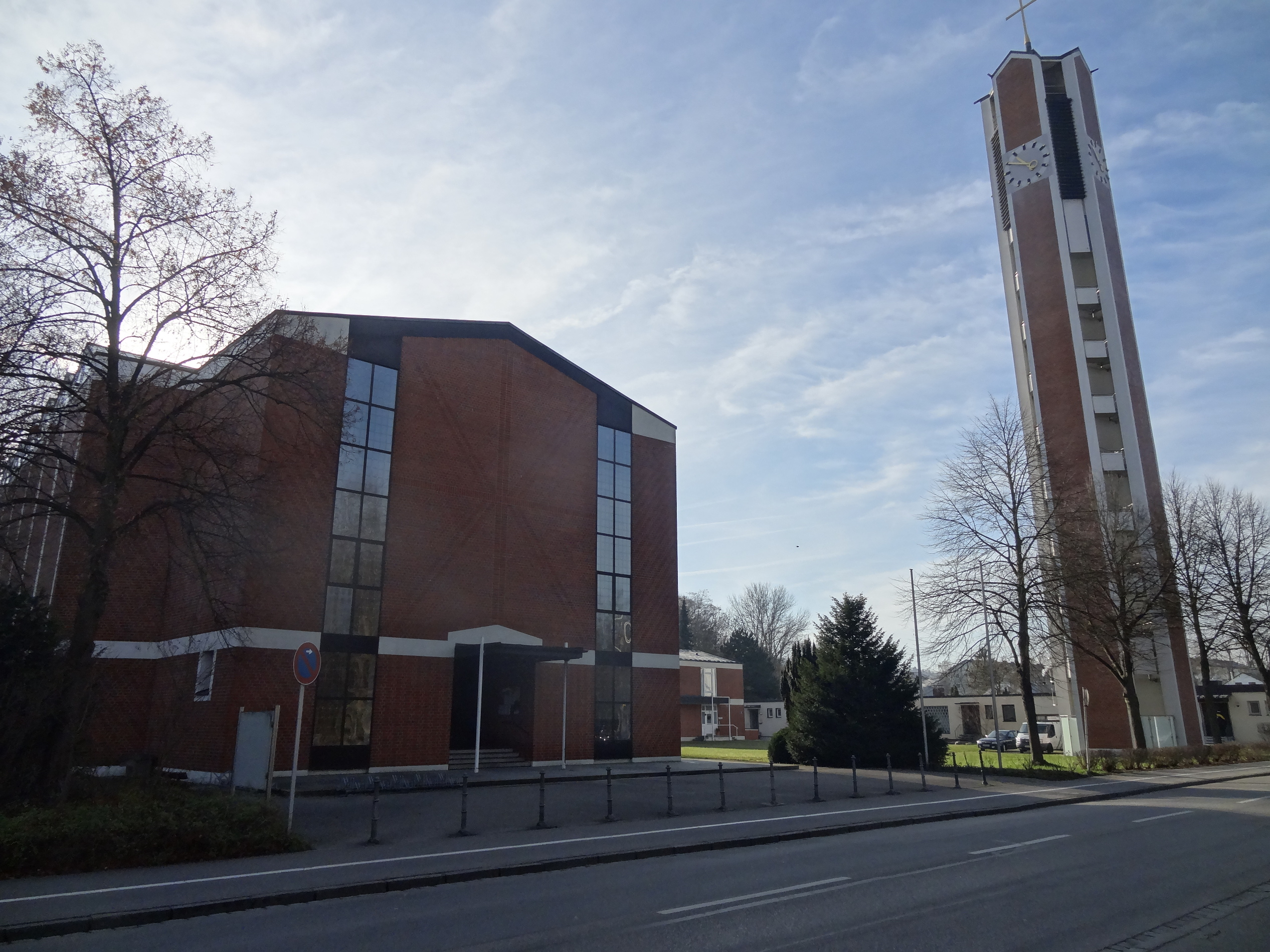 Katholische Pfarrkirche St. Pius in Landshut-West